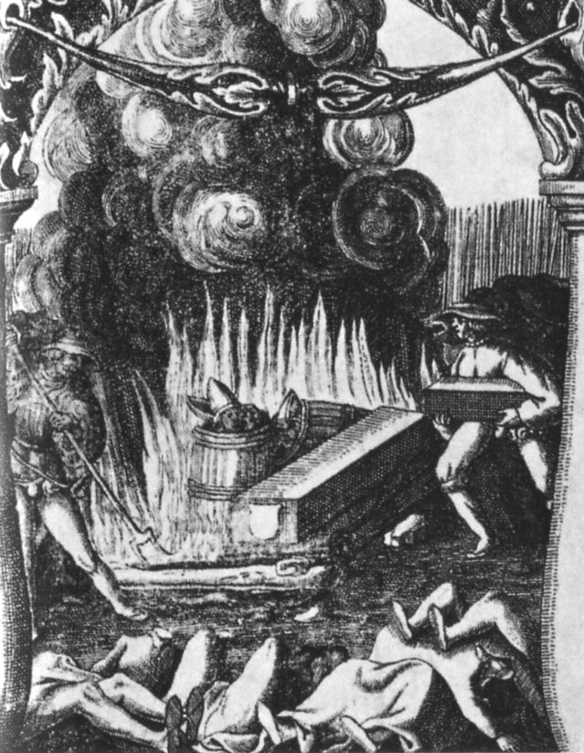 Blodbadstavlans serierutor, scen 5